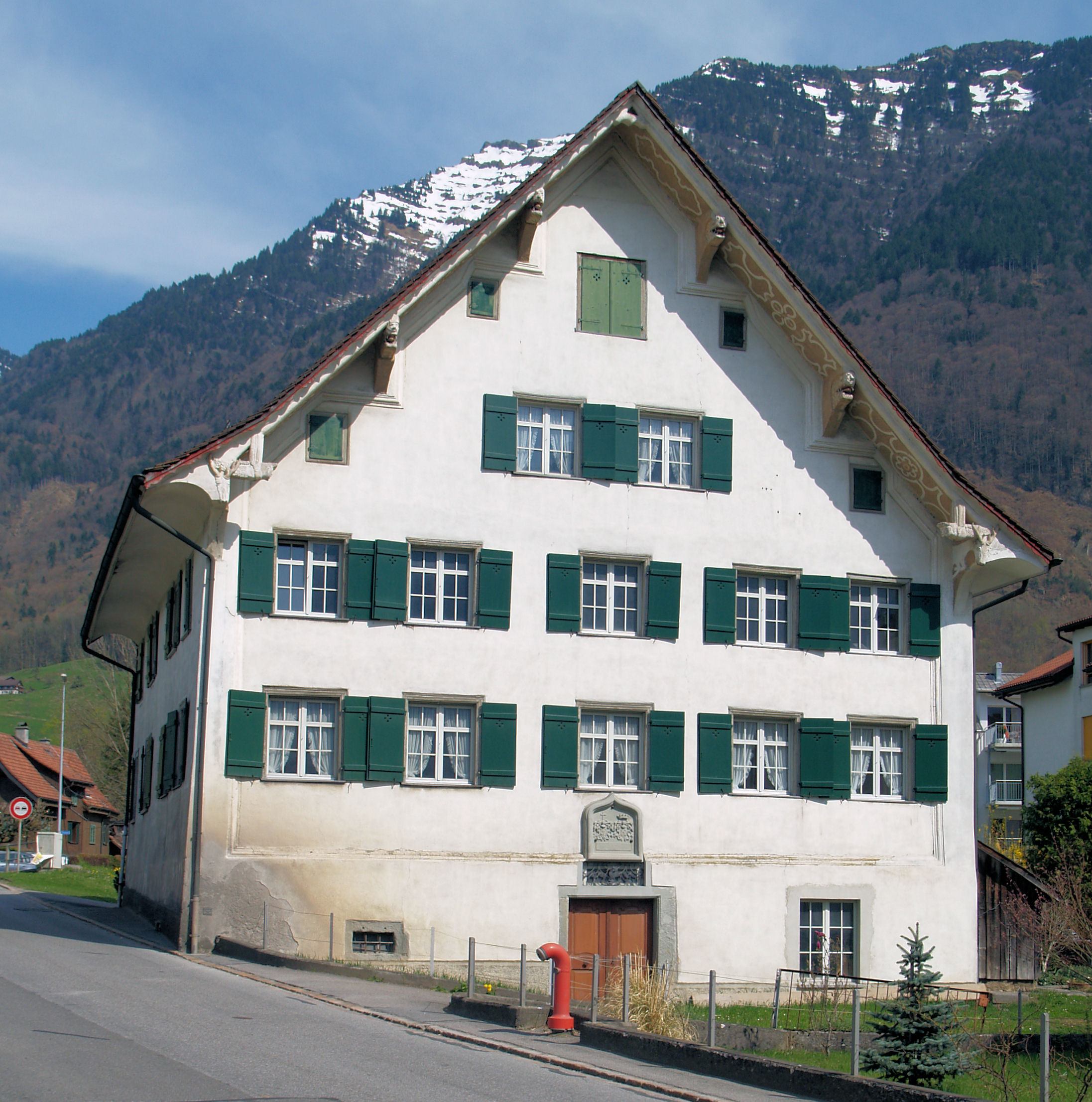 Die Südfront des Steinerhaus in Schänis